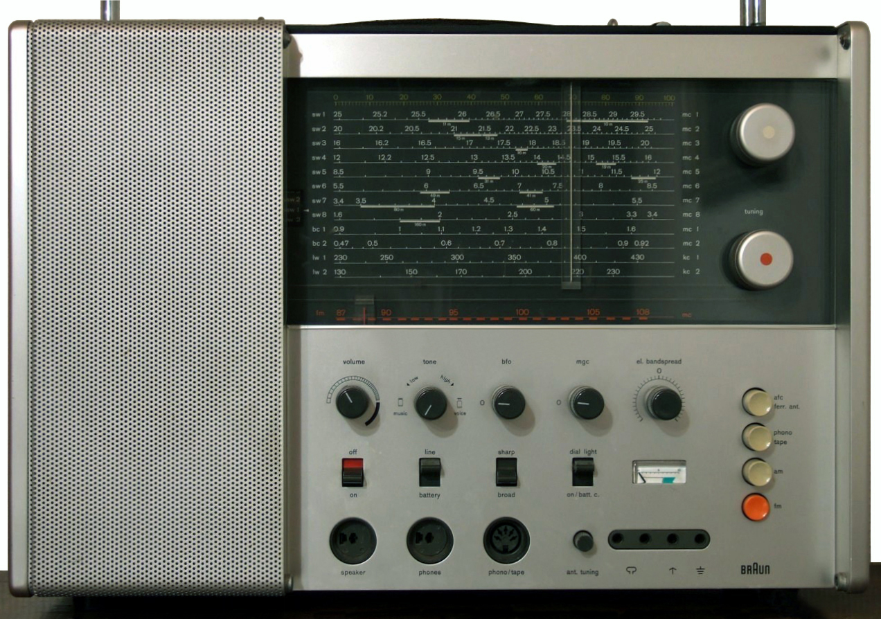 Ein Kurzwellenempfaenger: Braun T 1000 CD